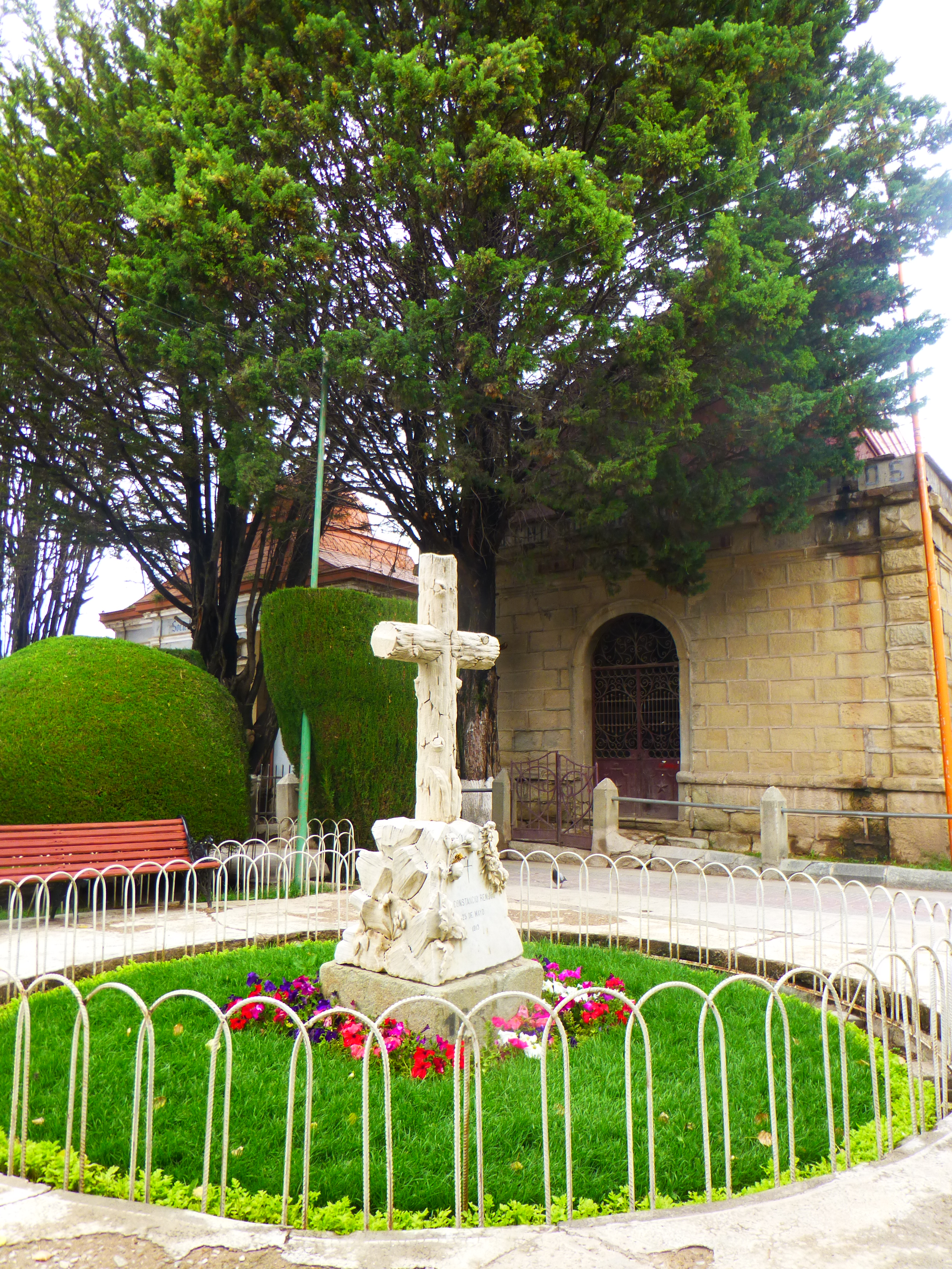 Cruz en el cementerio de Oruro, Bolivia